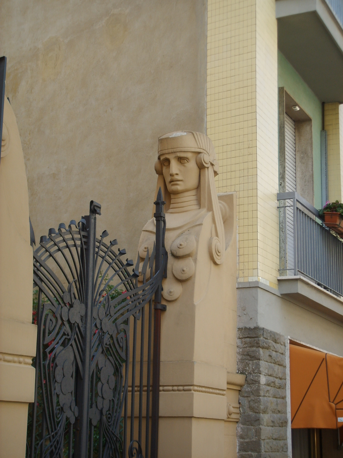 Casa antonini cancello